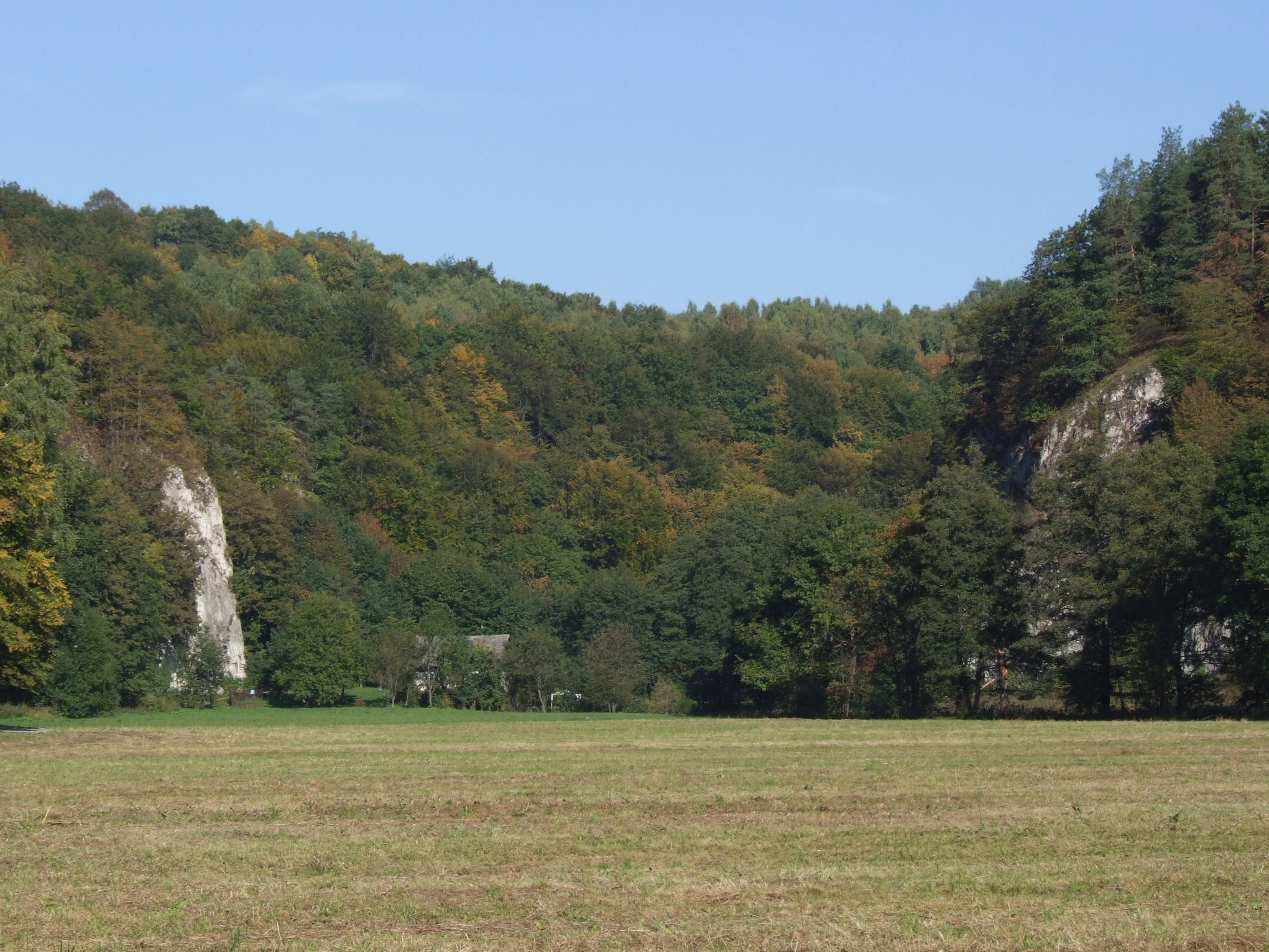 Skały Golanka i Grzybowa tworzące bramę skalną w Ojcowskim Parku Narodowym